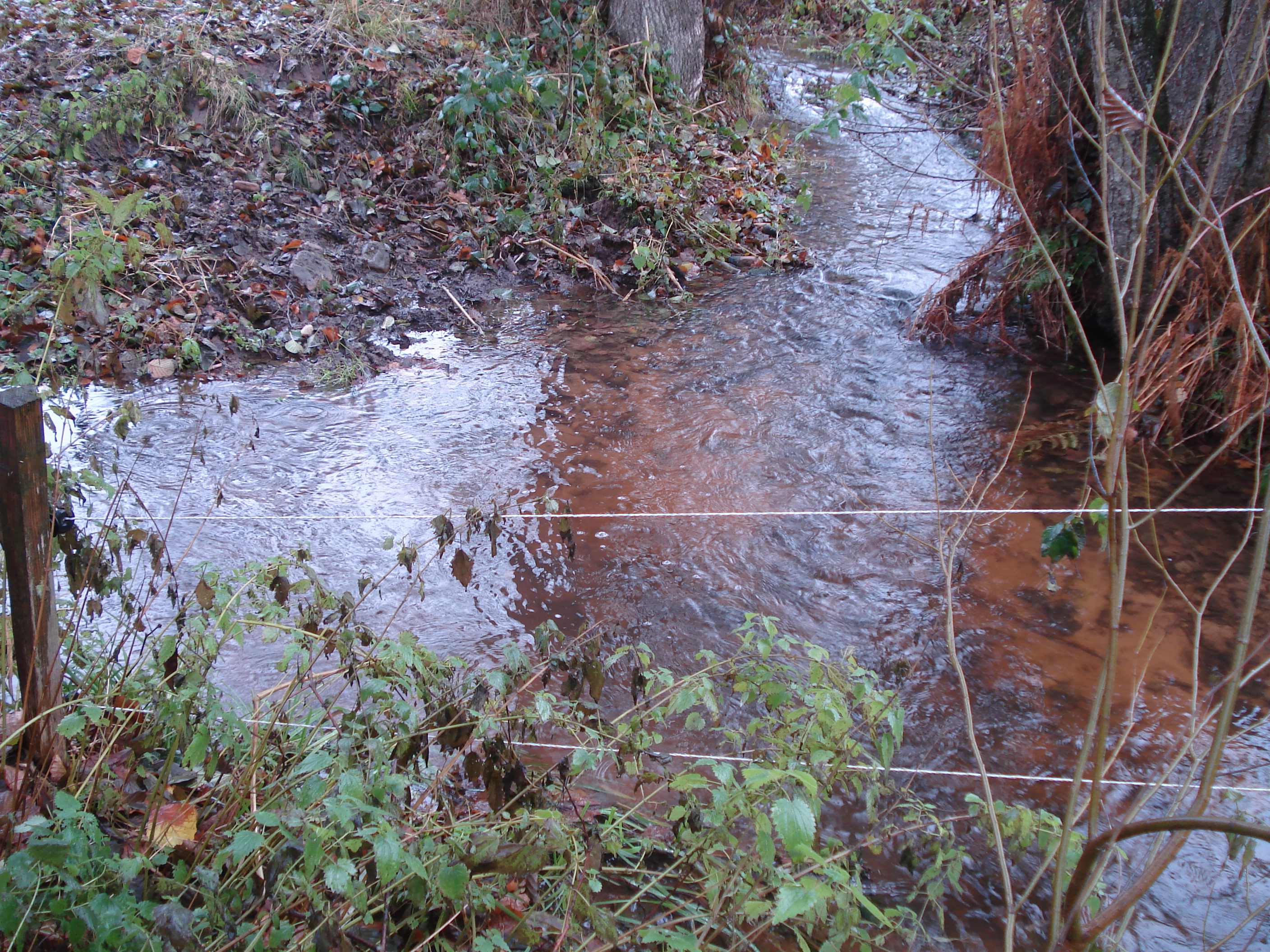 Der Heinstermühlbach (links) mündet in den Mangelsbach (von hinten nach rechts)